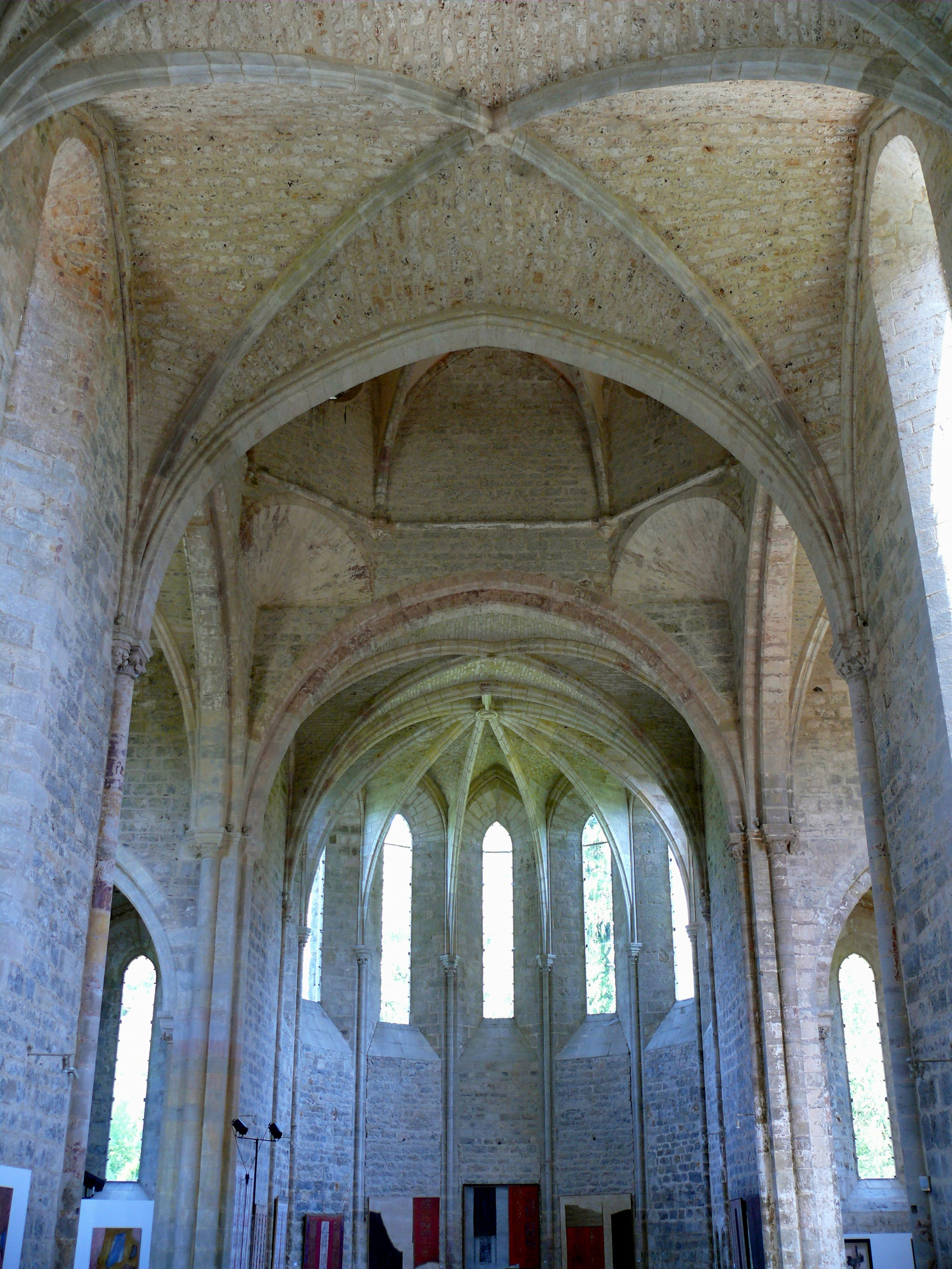 Abbaye de Beaulieu-en-Rouergue - Eglise - La nef et le choeur